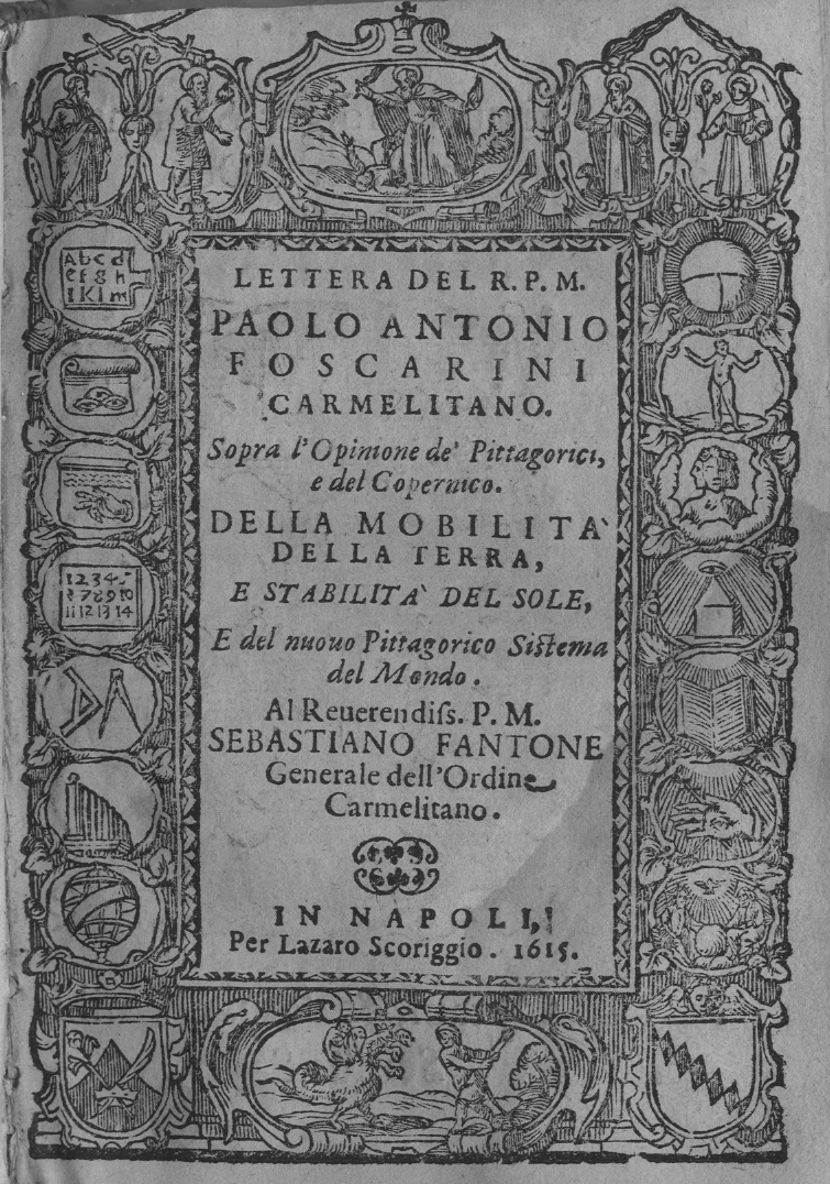 Paolo Antonio Foscarini (1565-1616), Lettera sopra l'opinione de' pittagorici, e del Copernico, della mobilità della terra e stabilità del sole, Napoli, Lazaro Scoriggio 1615